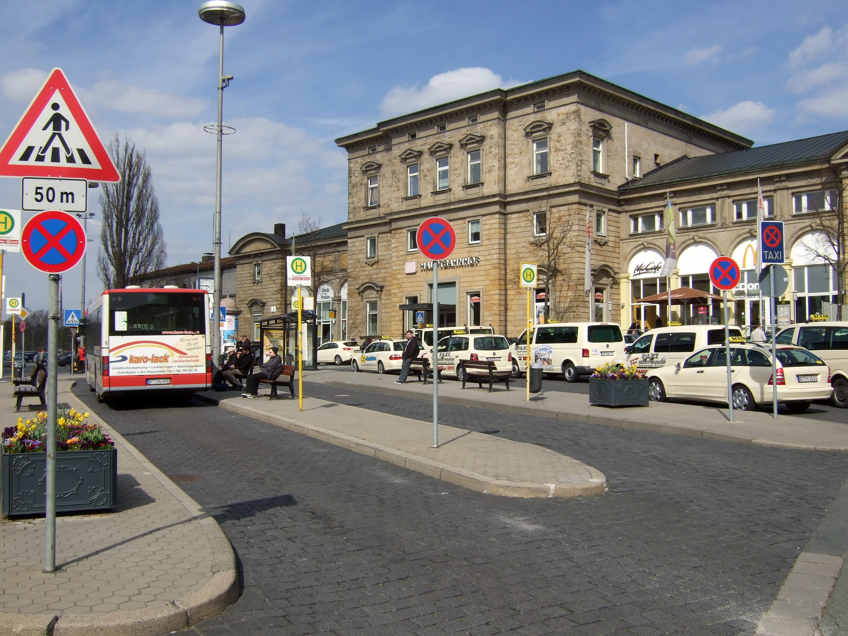 Bushaltestelle Hauptbahnhof Bayreuth